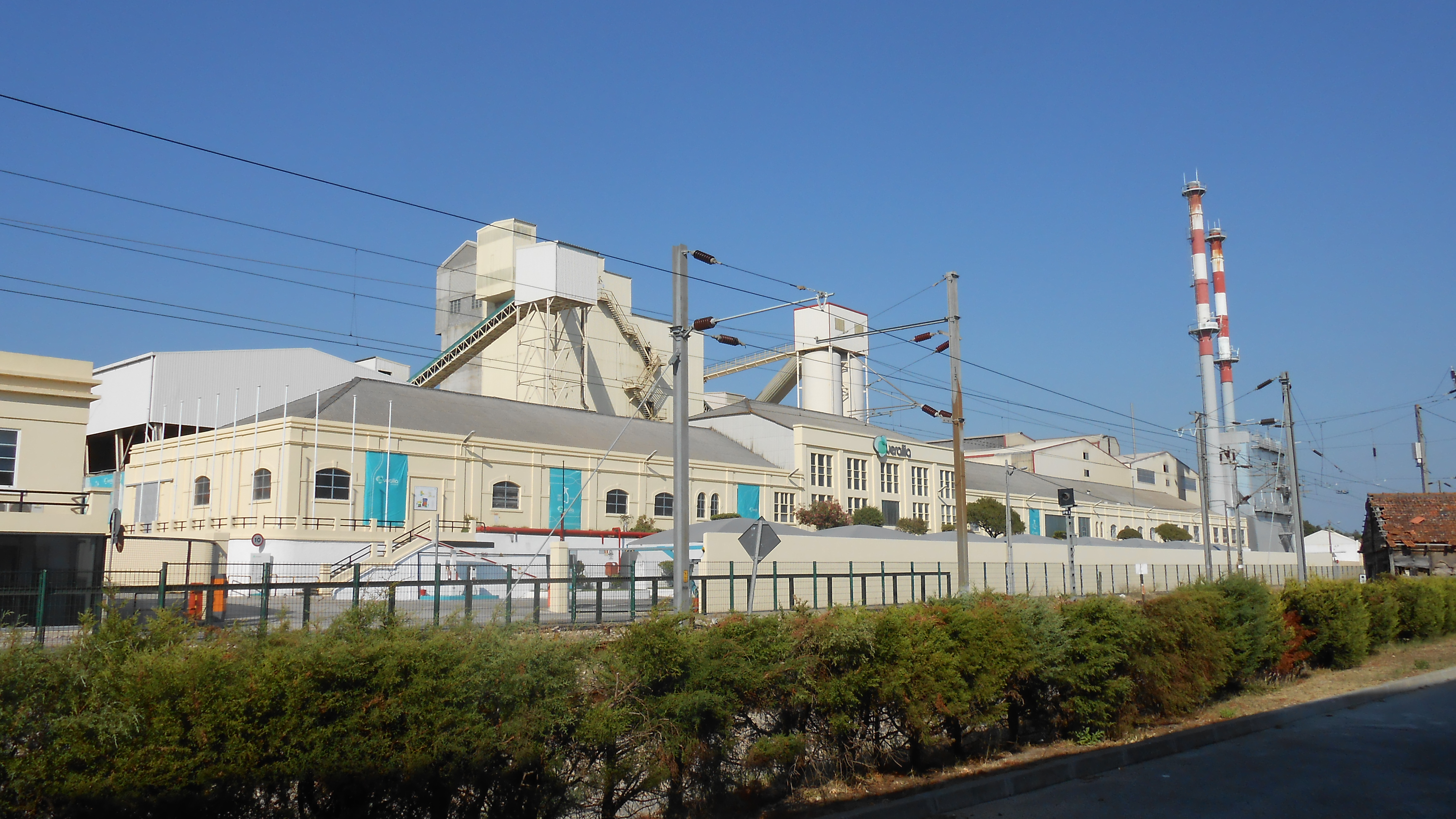 A Vidreira da Fontela, desde 1987 pertencente à francesa Compagnie de Saint-Gobain.